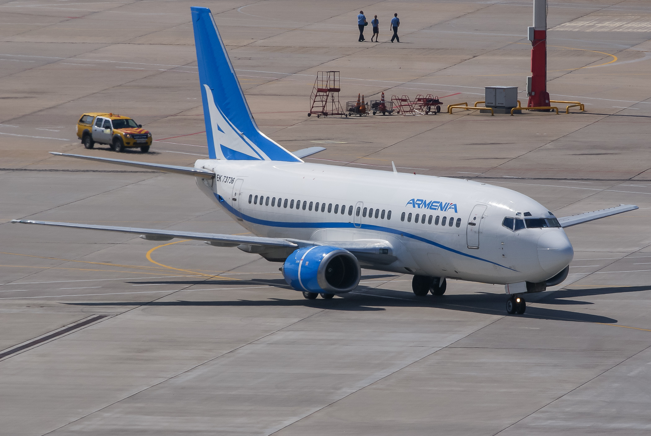 EK-73736 B735 Armenia VKO